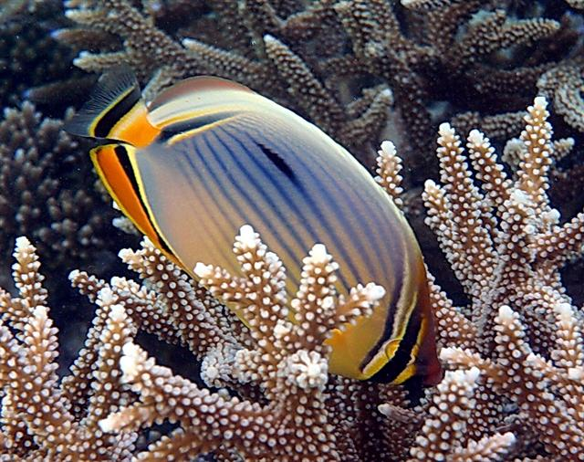 Chaetodon trifasciatus en Mirihi, Maldivas.